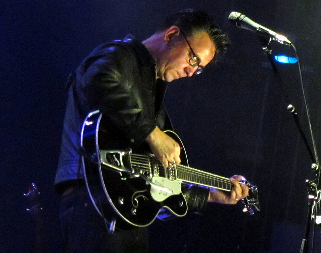 Richard Hawley in de AB, Brussel.